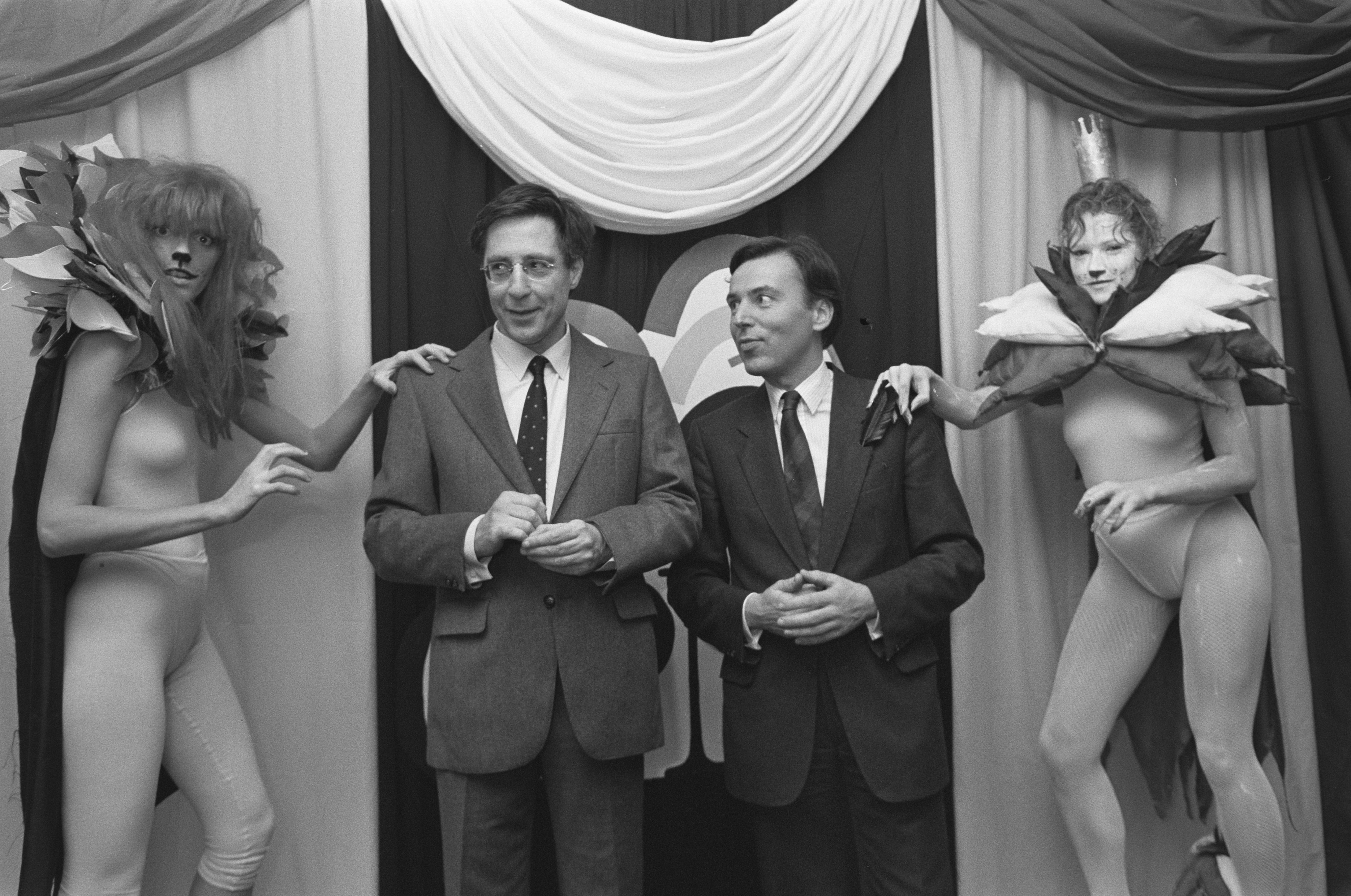 Boekenbal; minister Brinkman (r) en Maarten Biesheuvel geflankeerd door leeuwen van Nederland en Vlaanderen. Amsterdam, 15 maart 1988